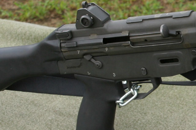 89式5.56mm小銃のセレクターレバー金沢駐屯地創立57周年記念行事にて